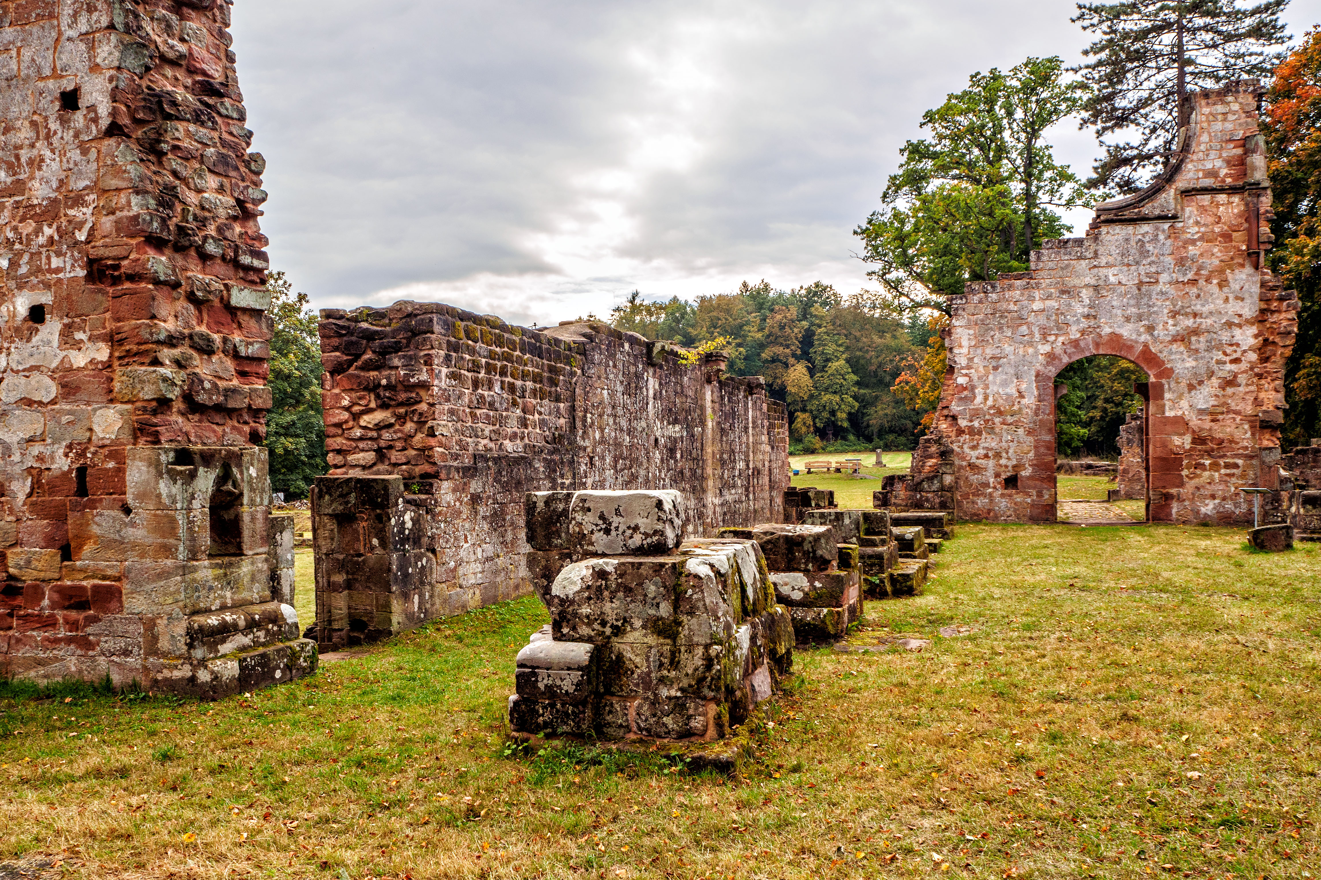 Kloster Wörschweiler, Blick aus dem Inneren der Kirche auf das Portal